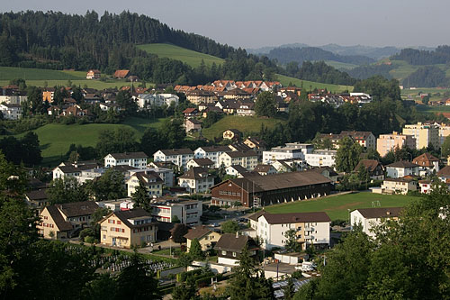 Festhalle von Willisau